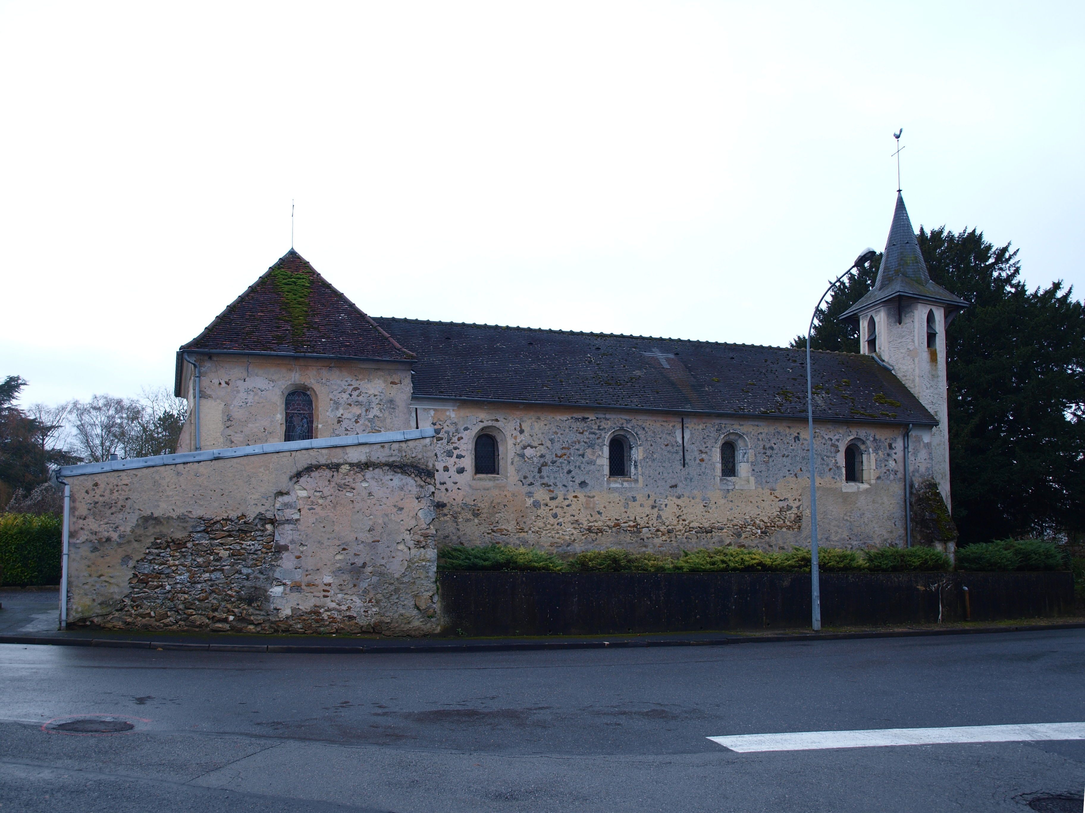 Chierry (Aisne, France) ; église